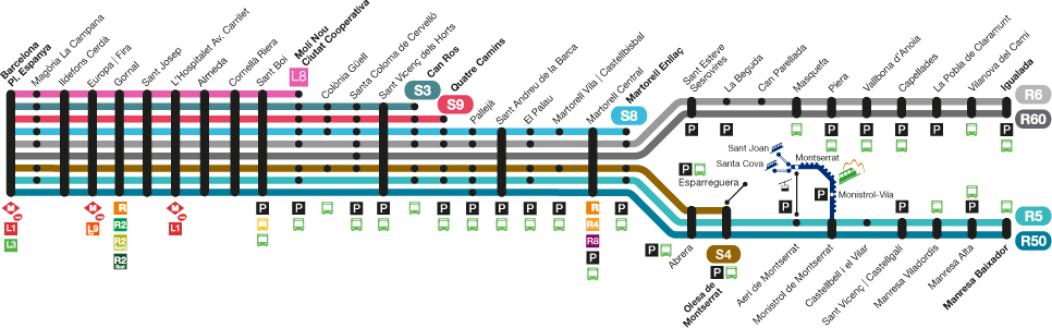 Mapa de la Línia Llobregat-Anoia operada por FGC